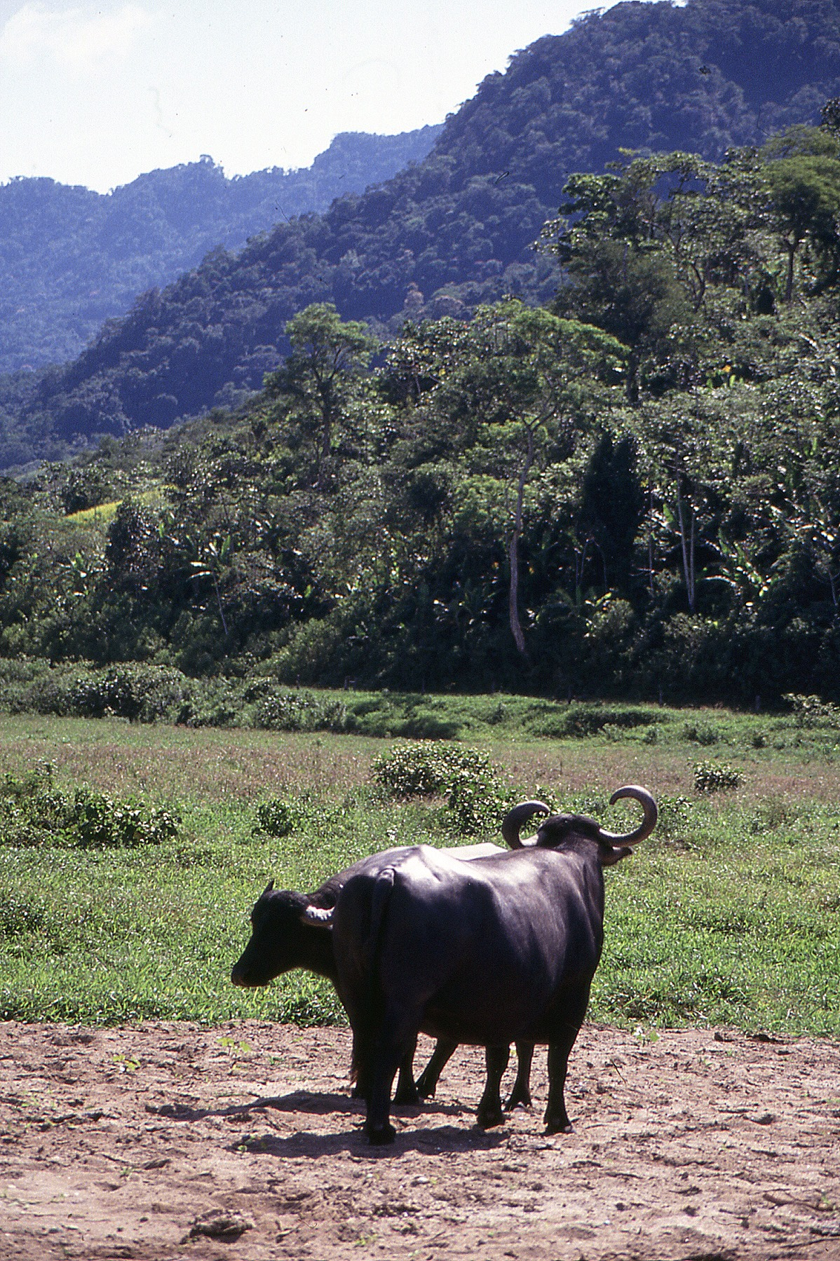 Umgebung Hotel Portobello bei Margaratiba, Wasserbüffel